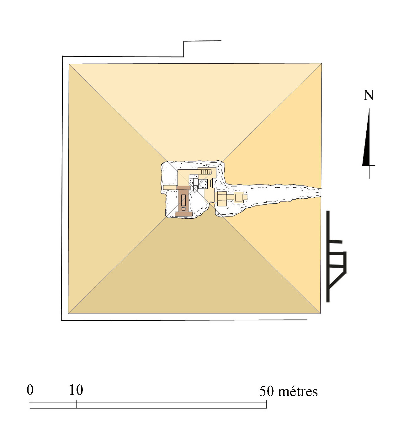 Plan de la pyramide d'Ameni kemaou à Dahchour